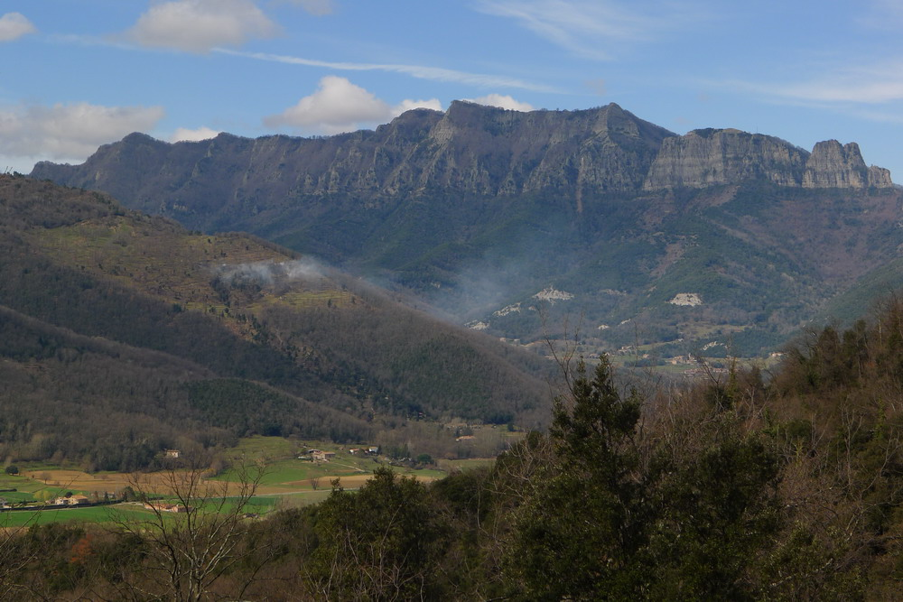 Puigsacalm